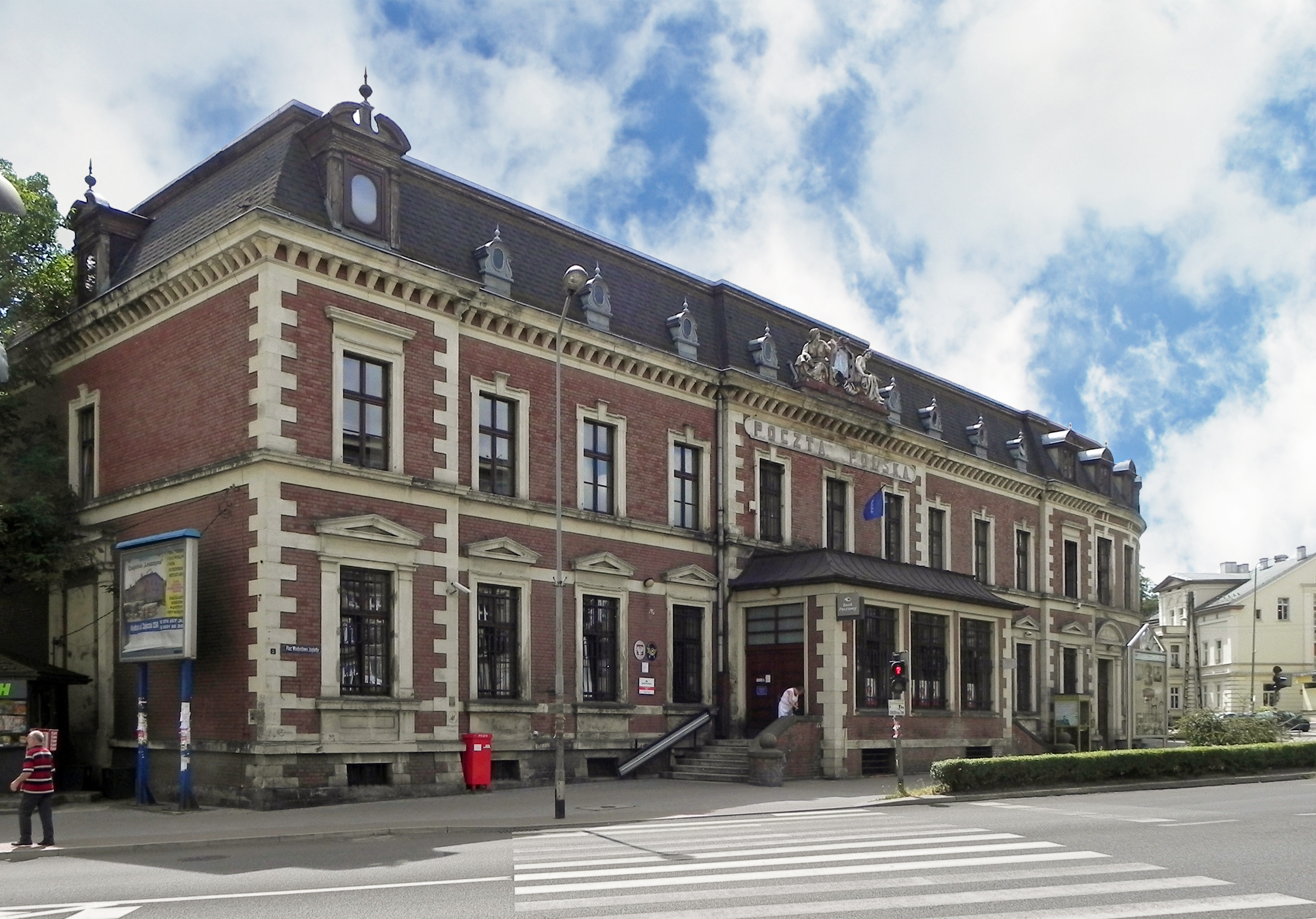 Kłodzko, dom, 1870